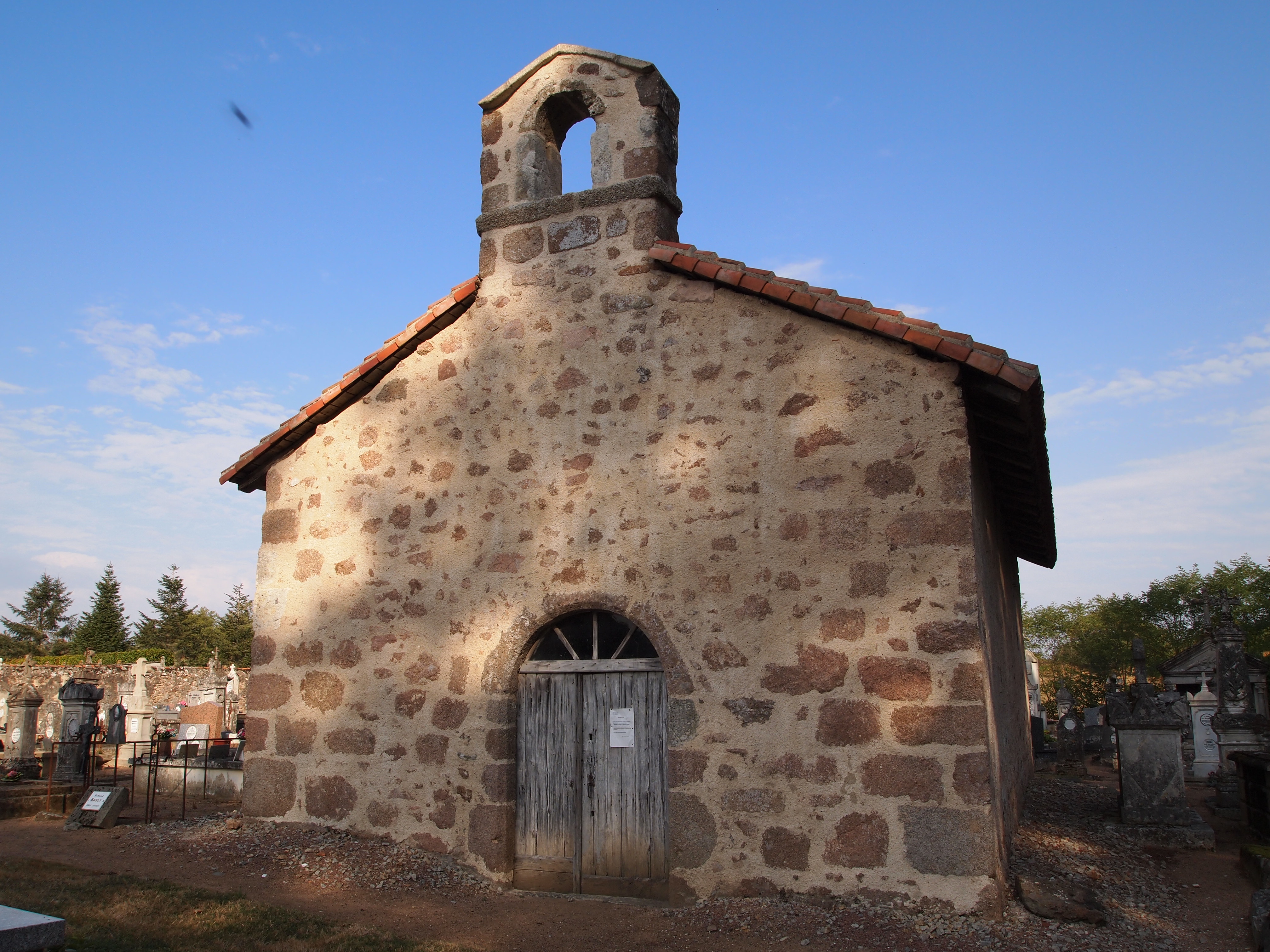 Chapelle du cimetière de Chirac, en Charente (France) (classé, 1977)